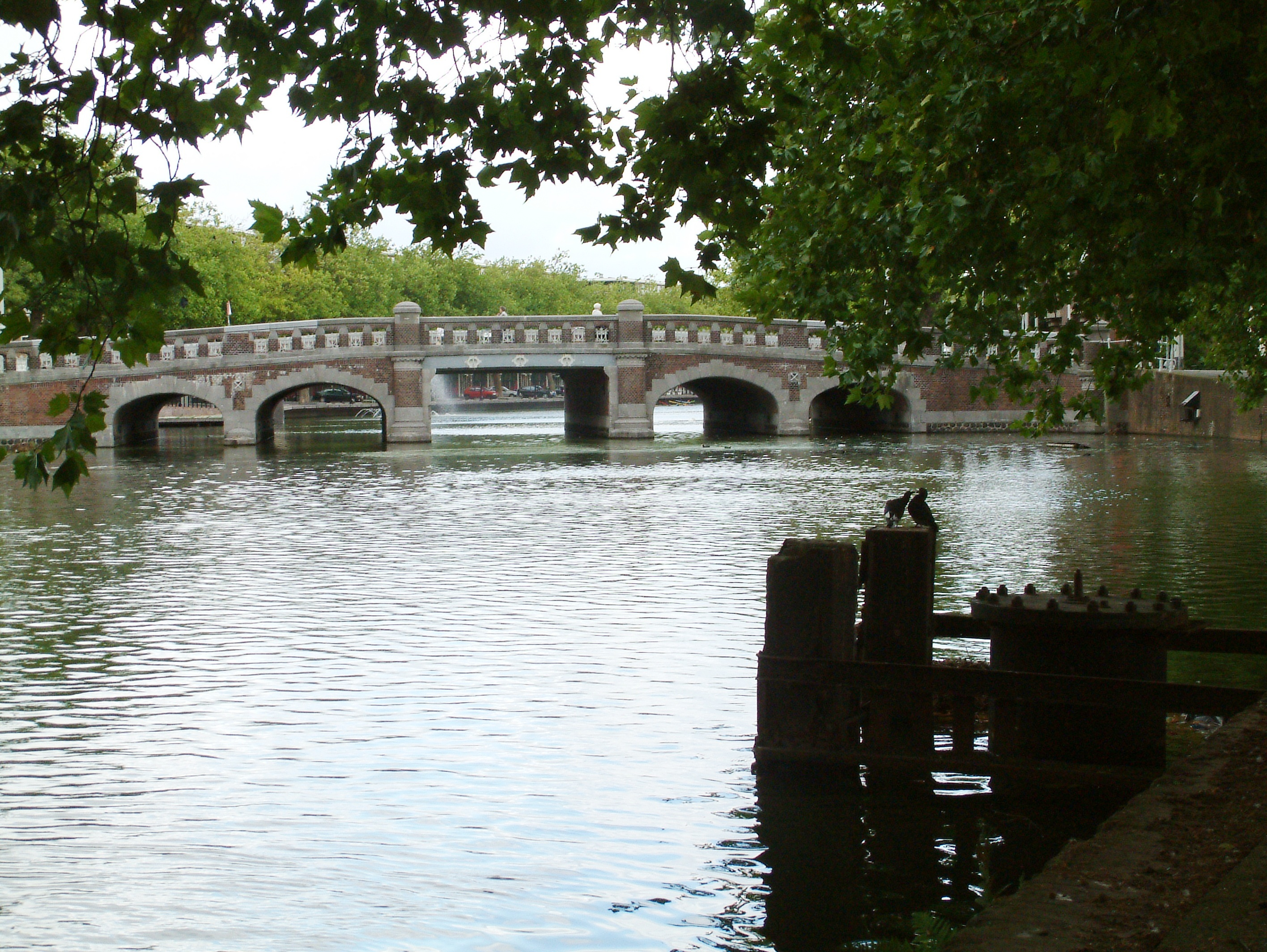 Bruggen over de Rotte, De Noorderbrug, zuidkant